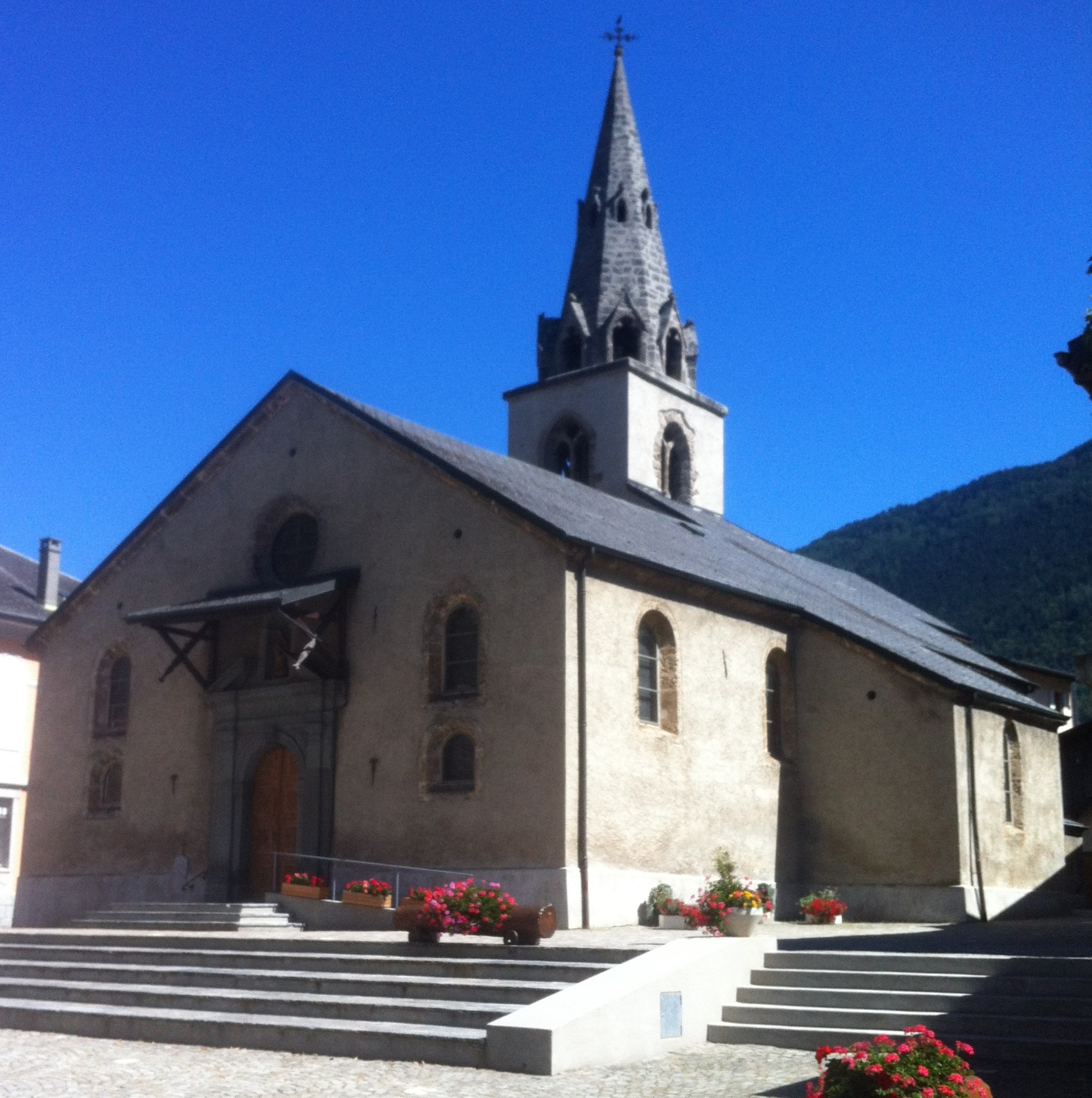 Iglesia rural en Sembrancher (entre Martigny y Orsieres)